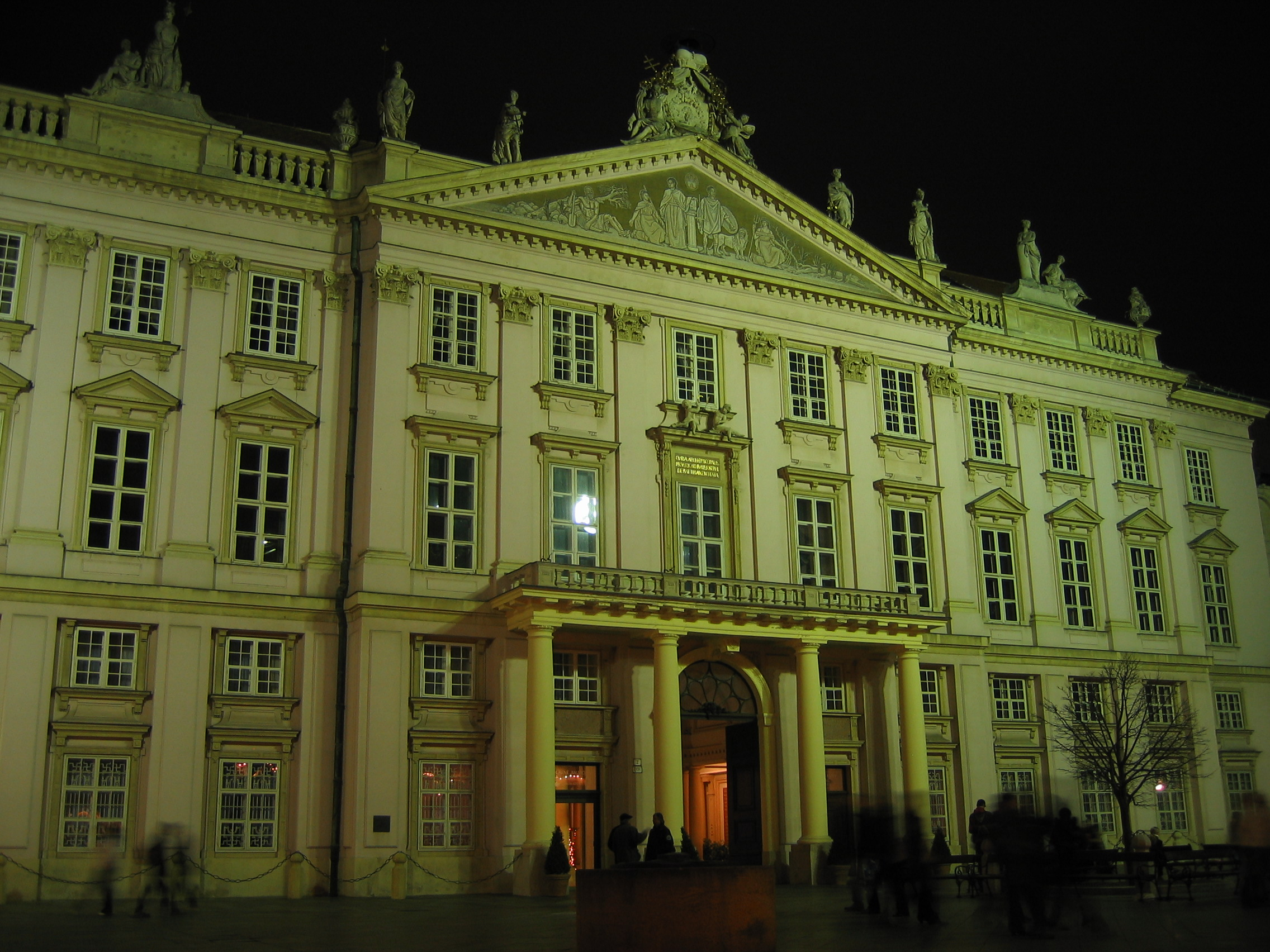 Primatialpalast, primatial palace, Primaciálny palác, Bratislava